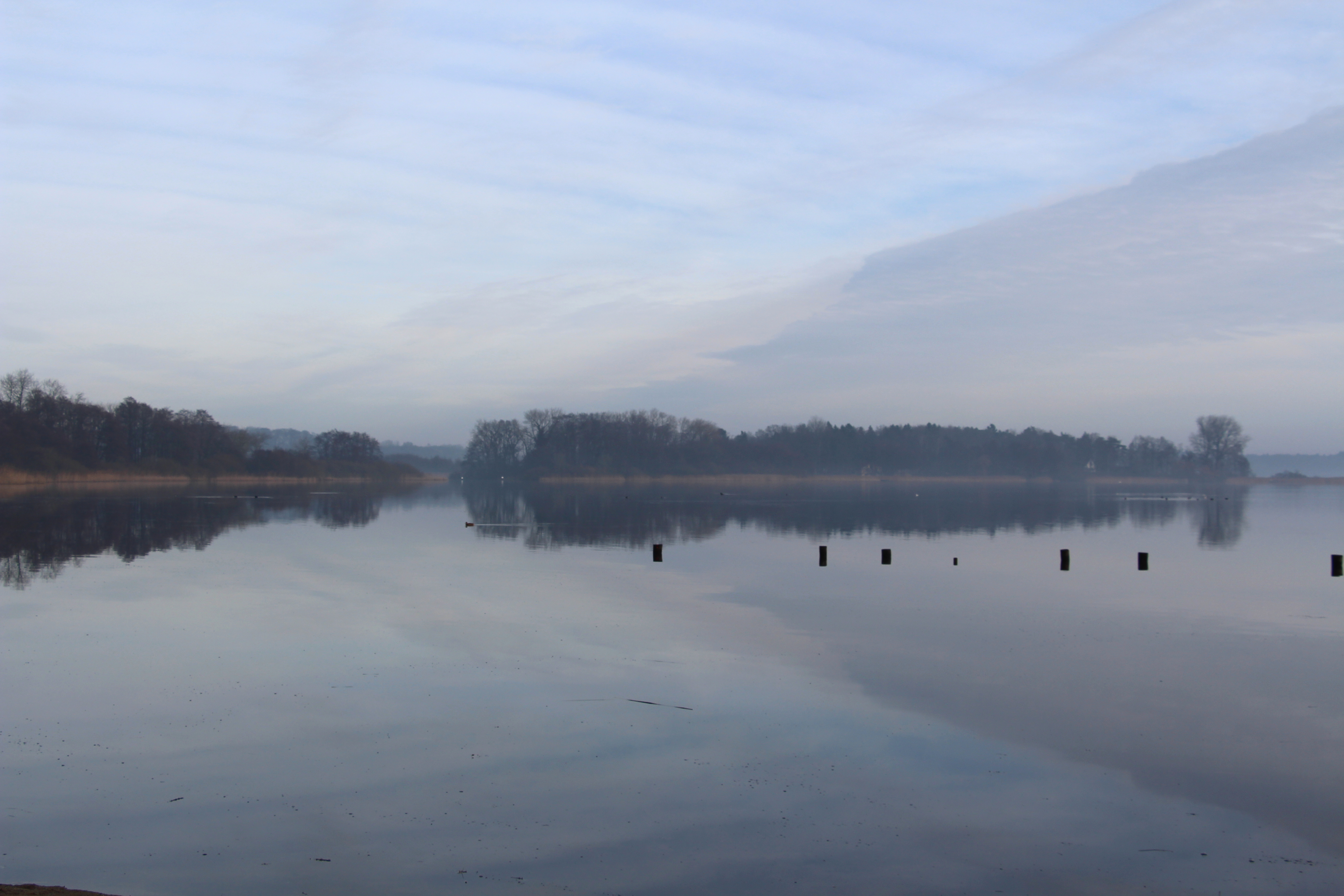 Winterstimmung am Westensee, Blick von der Westenseer Bucht zur Durchfahrt zum Bossee